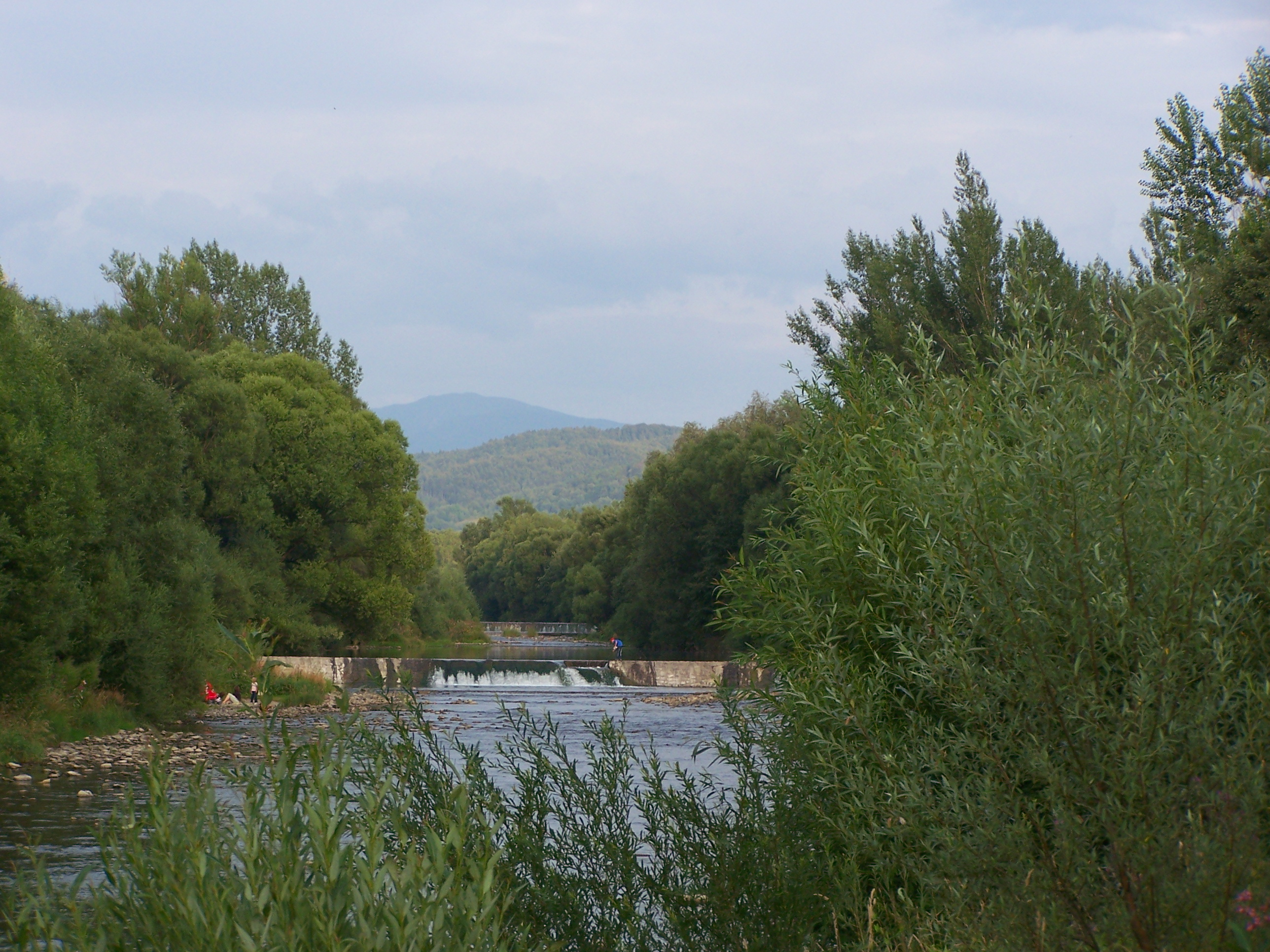 Rzeka Soła przepływająca przez Żywiec.